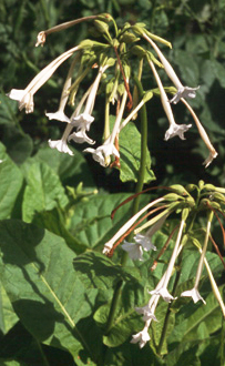 Nicotiana sylvestris (Waldtabak) Martin Barth, aufgenommen im Garten des Tabakmuseums Vierraden (Schwedt) im August 2003 Mit freundlicher Zustimmung des Urhebers